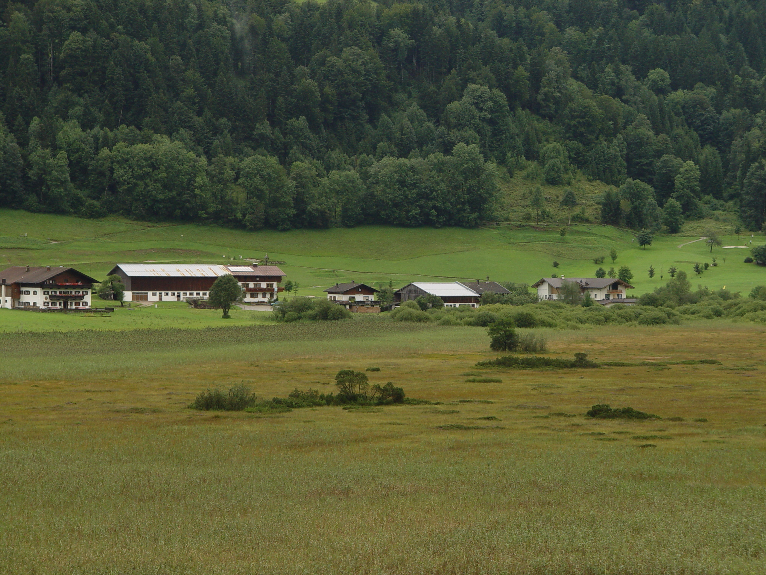 "Transitional moor" (between lowland- and upland moor) "Schwemm" in Walchsee, Tirol. German description: Das Zwischenmoor "Schwemm" bei Walchsee in Tirol.